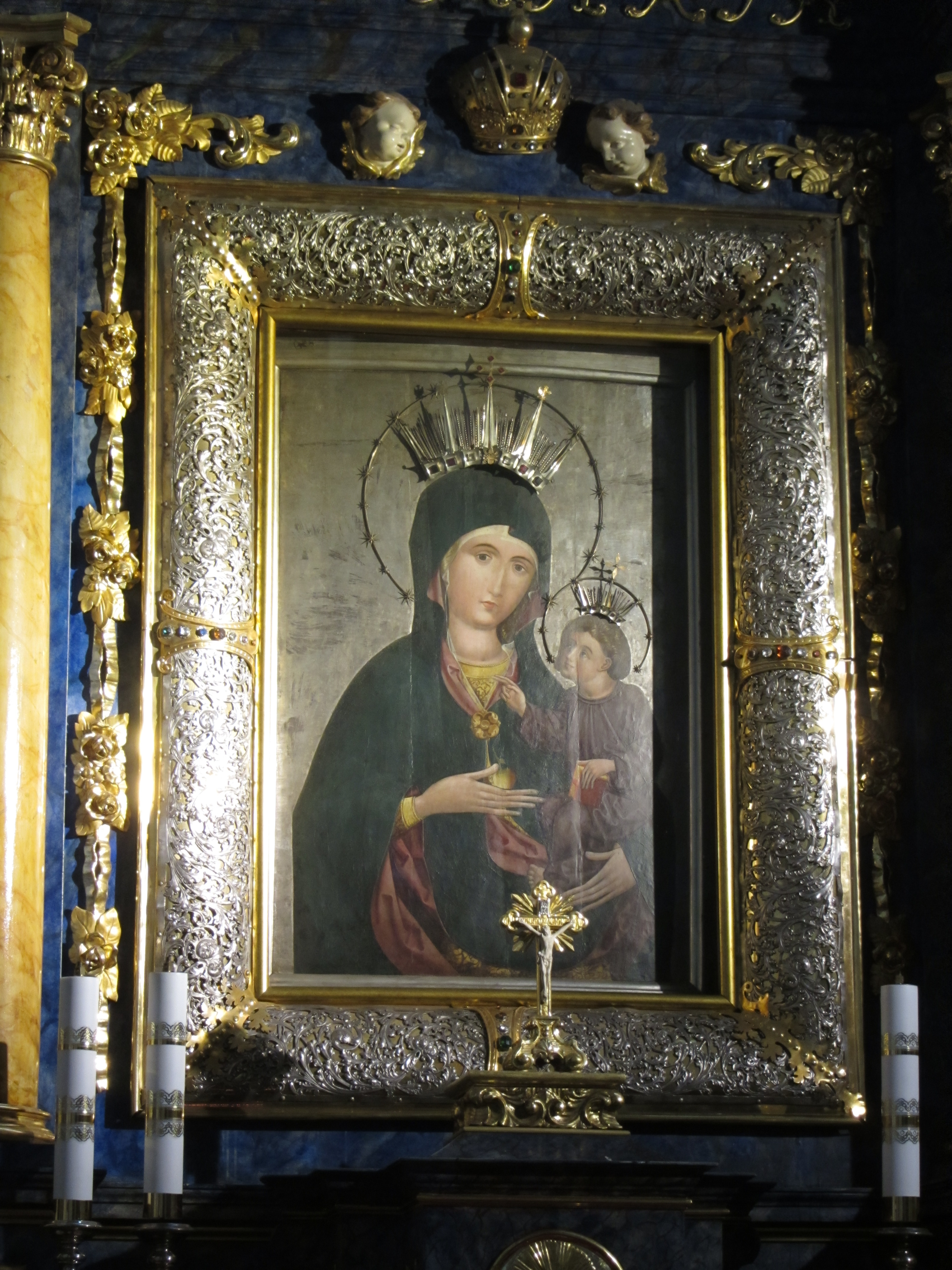 Gnadenbilder der Mutter Gottes Oppeln Kathedrale